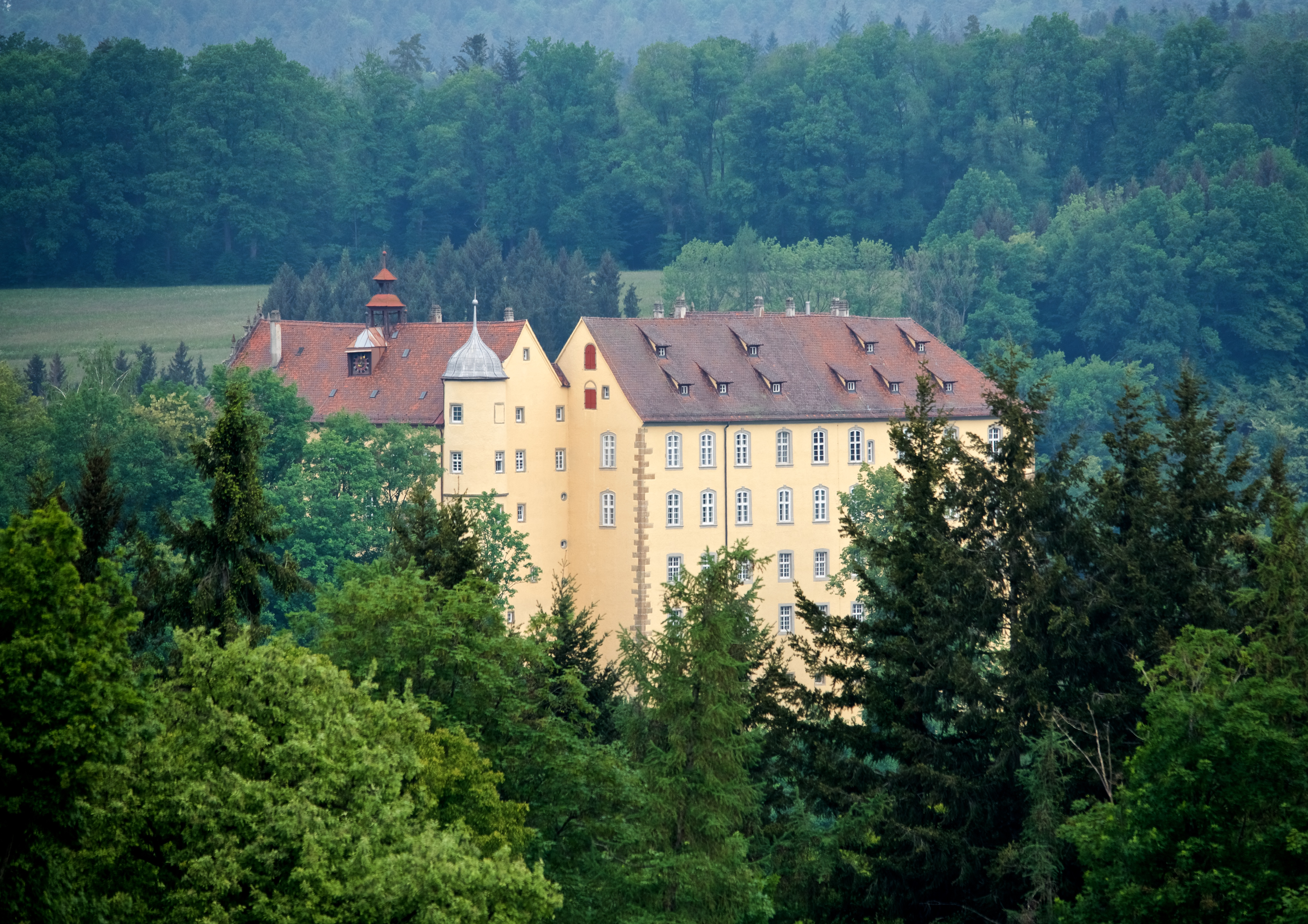 Schloss Untergröningen, von Tyrol gesehen